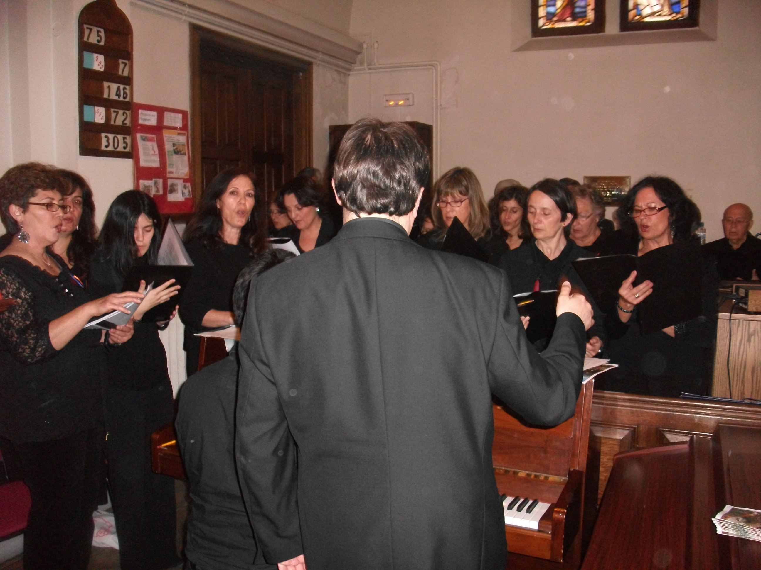 Ina armena ĥoro kantas dum meso en Madrido, en aprilo 2011.